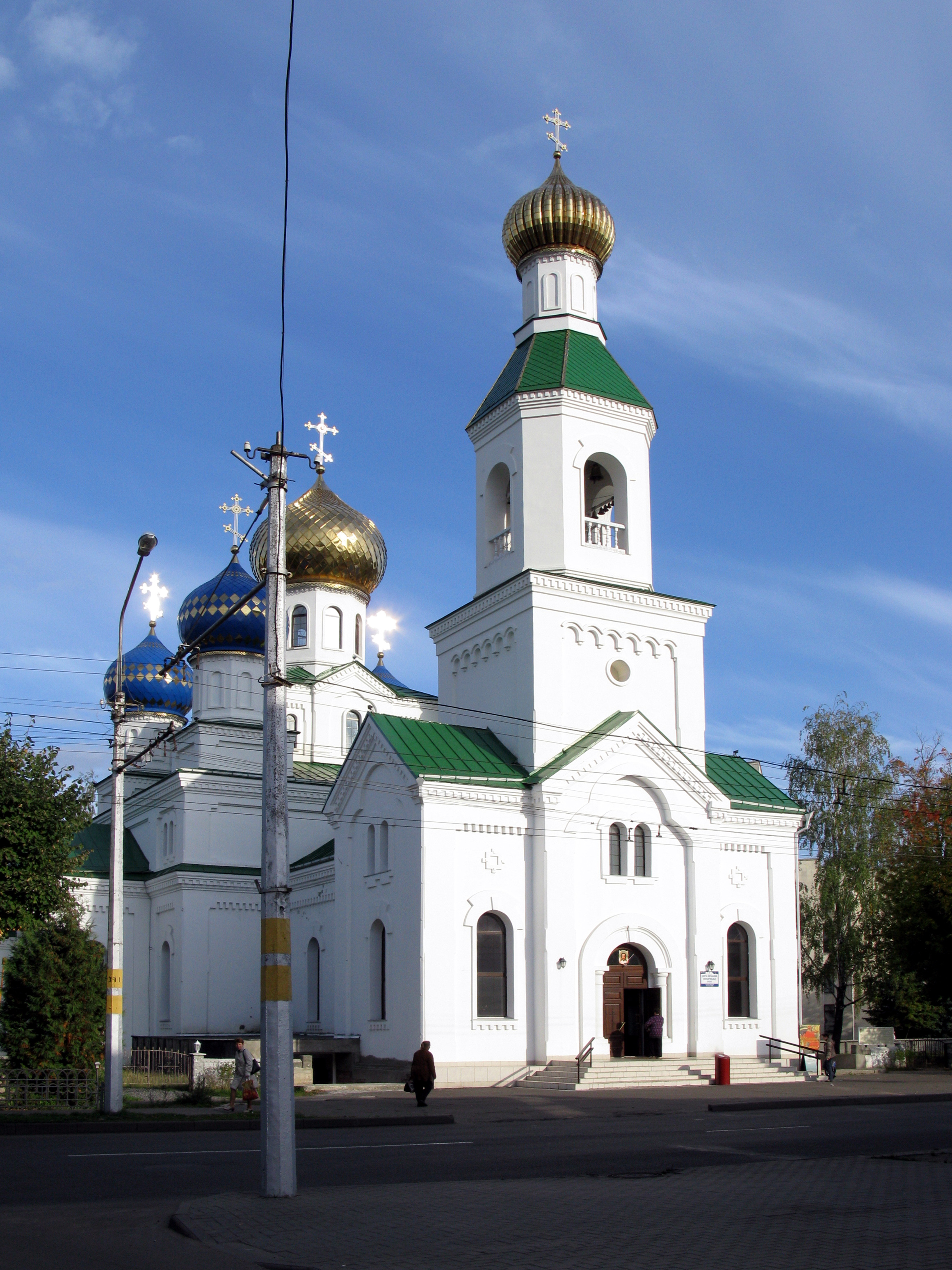 Никольский собор (Бобруйск, Могилёвская область, Белоруссия).